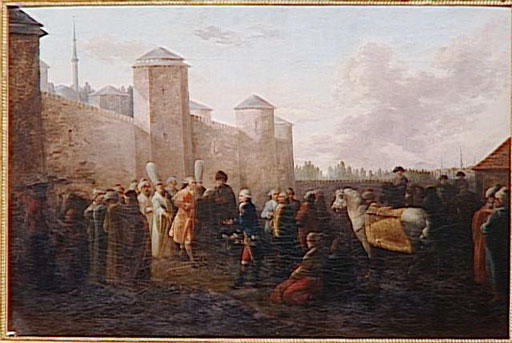 LE PRINCE PIERRE REPNIN DELIVRE DE LA PRISON DES SEPT TOURS EN PRESENCE du Compte DE SAINT-PRIEST.25 SEPTEMBRE 1773